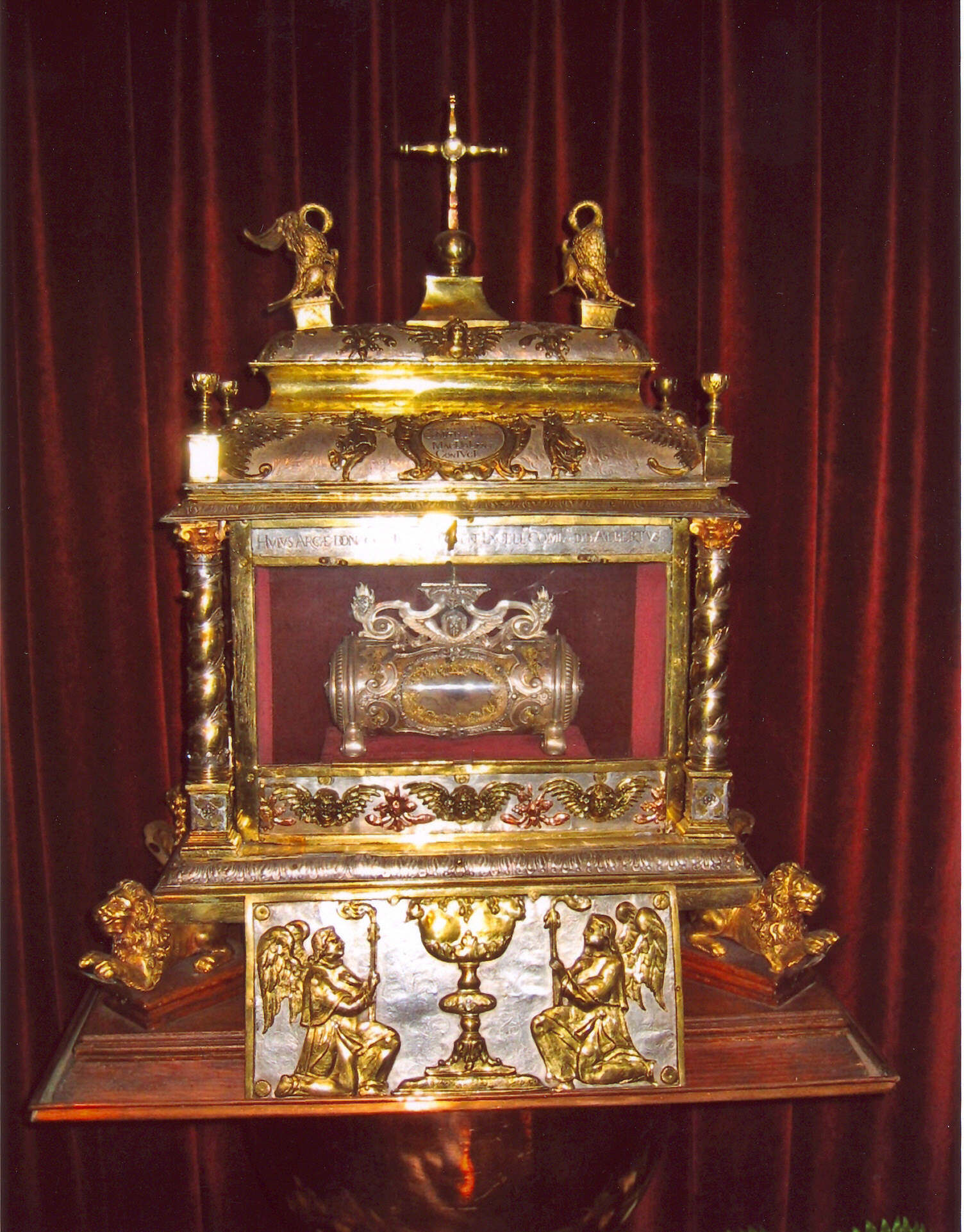 Draagkist met reliekcylinder Boxmeerse Vaart